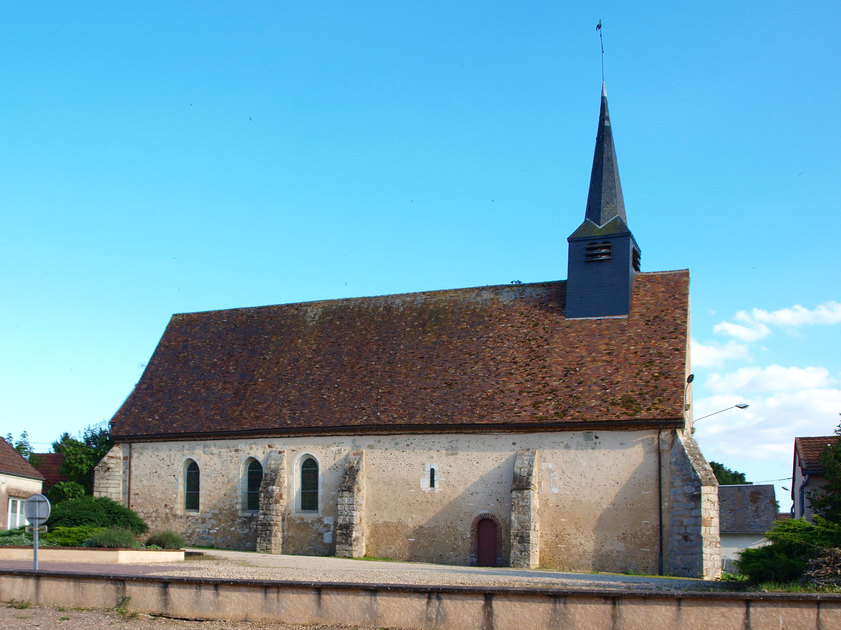 Vernoy (Yonne, France) ; l'église